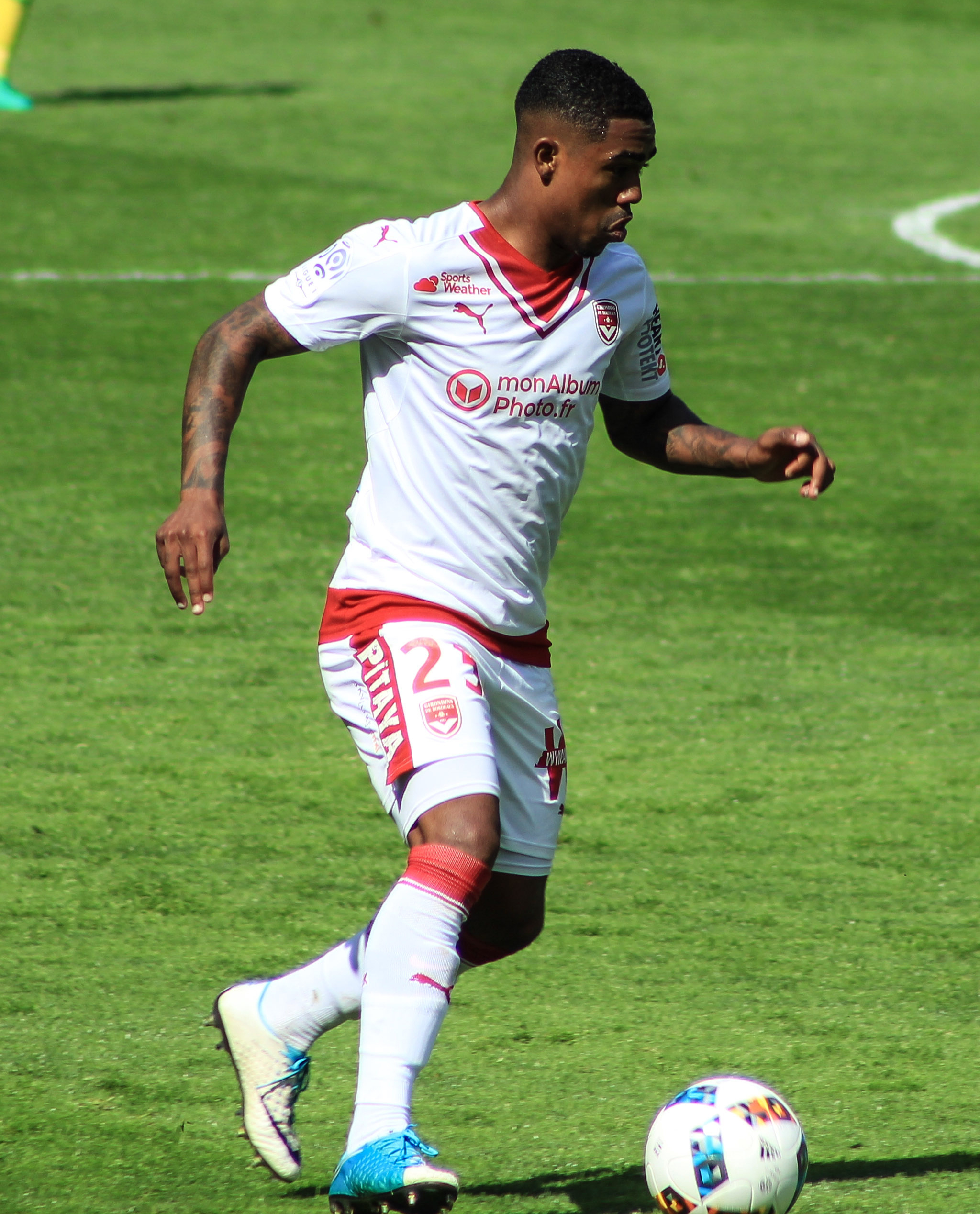 ENGLISH | PORTUGUÊS | FRANÇAIS | ESPAÑOL Follow my work in other social medias | Siga meu trabalho em outras redes | Suivre mon travail dans des autres reseaux | Sigue mi trabajo en otras redes sociales Facebook - F. Neitzke Photo - Instagram - @neitzkef - All my pictures can be republished or shared only after my given consent: Todas as fotos podem ser publicadas e/ou utilizadas mediante meu consentimento Tous les photos peuvent être utilisés ou publiés seulement après ma autorisation Todas mis fotos pueden volver a ser publicadas y compartirse únicamente bajo mi consentimiento dado